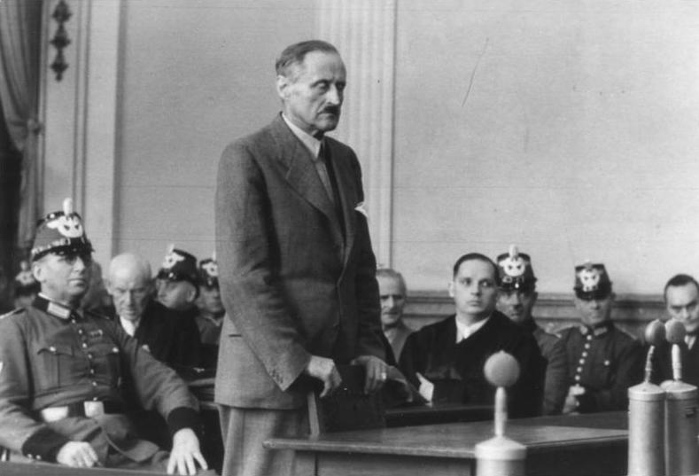 Volksgerichtshof, Ulrich von Hassell Prozeß 20. Juli 1944 [v. Hassell, Ulrich; im Hintergrund: Wirmer, Joseph (ganz rechts) sitzend neben Hassell: Offizialverteidiger Weimann] Abgebildete Personen: Hassell, Ulrich von: Botschafter in Italien, Prozess 20. Juli 1944, Deutschland (GND 118708988) Wirmer, Josef: Prozeß 20. Juli 1944, Deutschland (GND 11881818X)